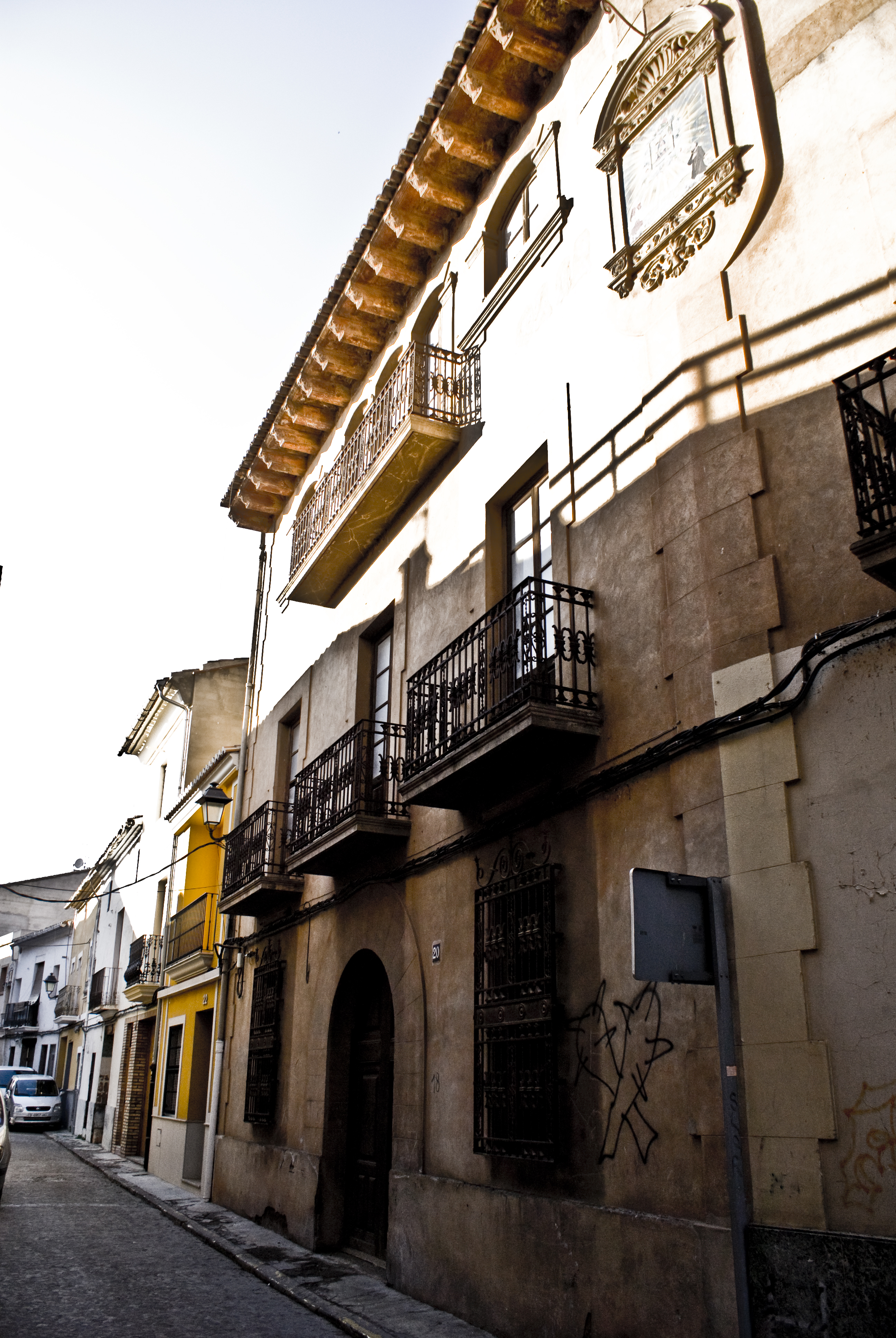 Casa social de Puçol. Façana principal.